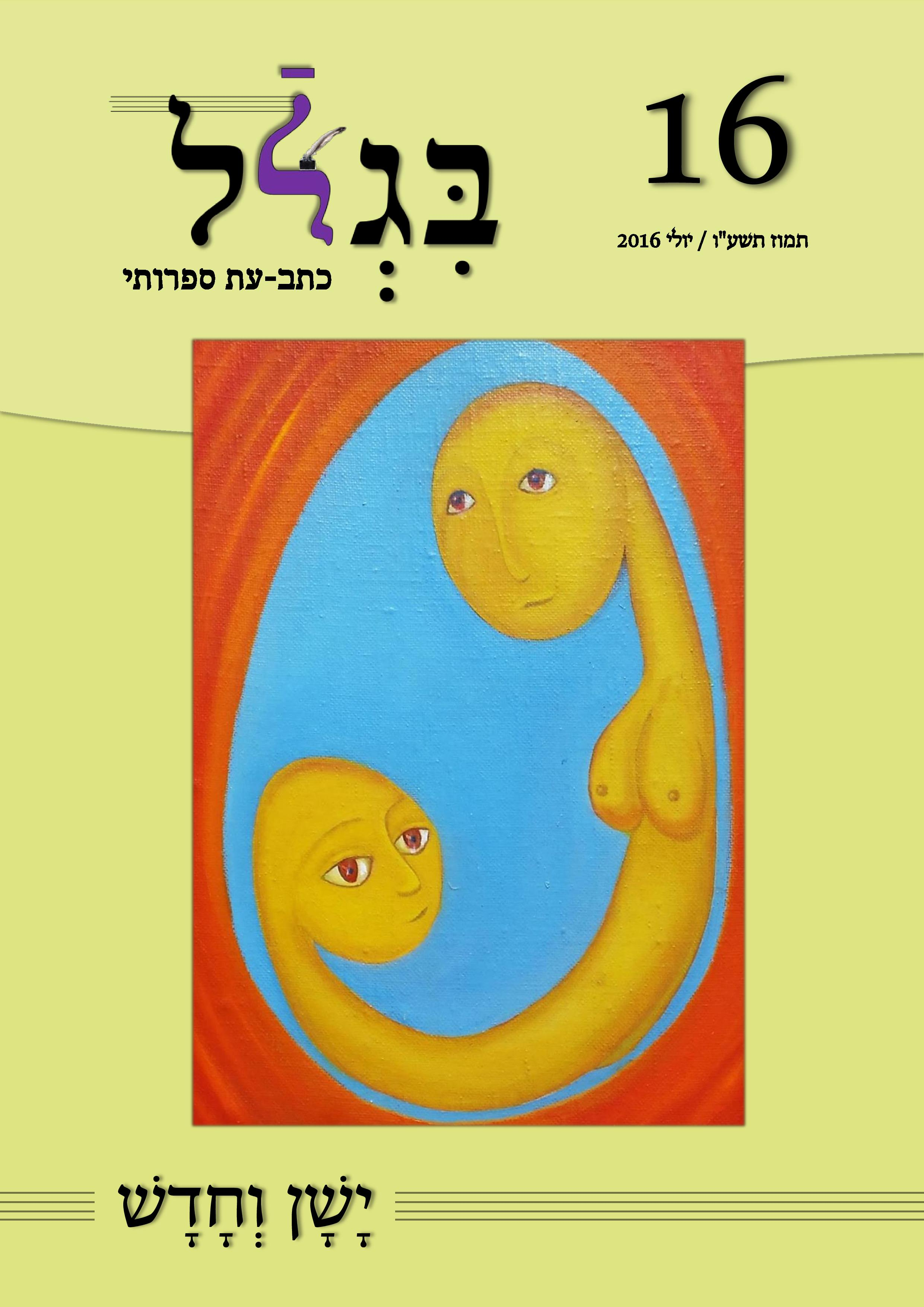 כריכת גיליון מס' 16 של "בגלל" (176 עמודים, יולי 2016). ציור השער: איגור קוצ'נב